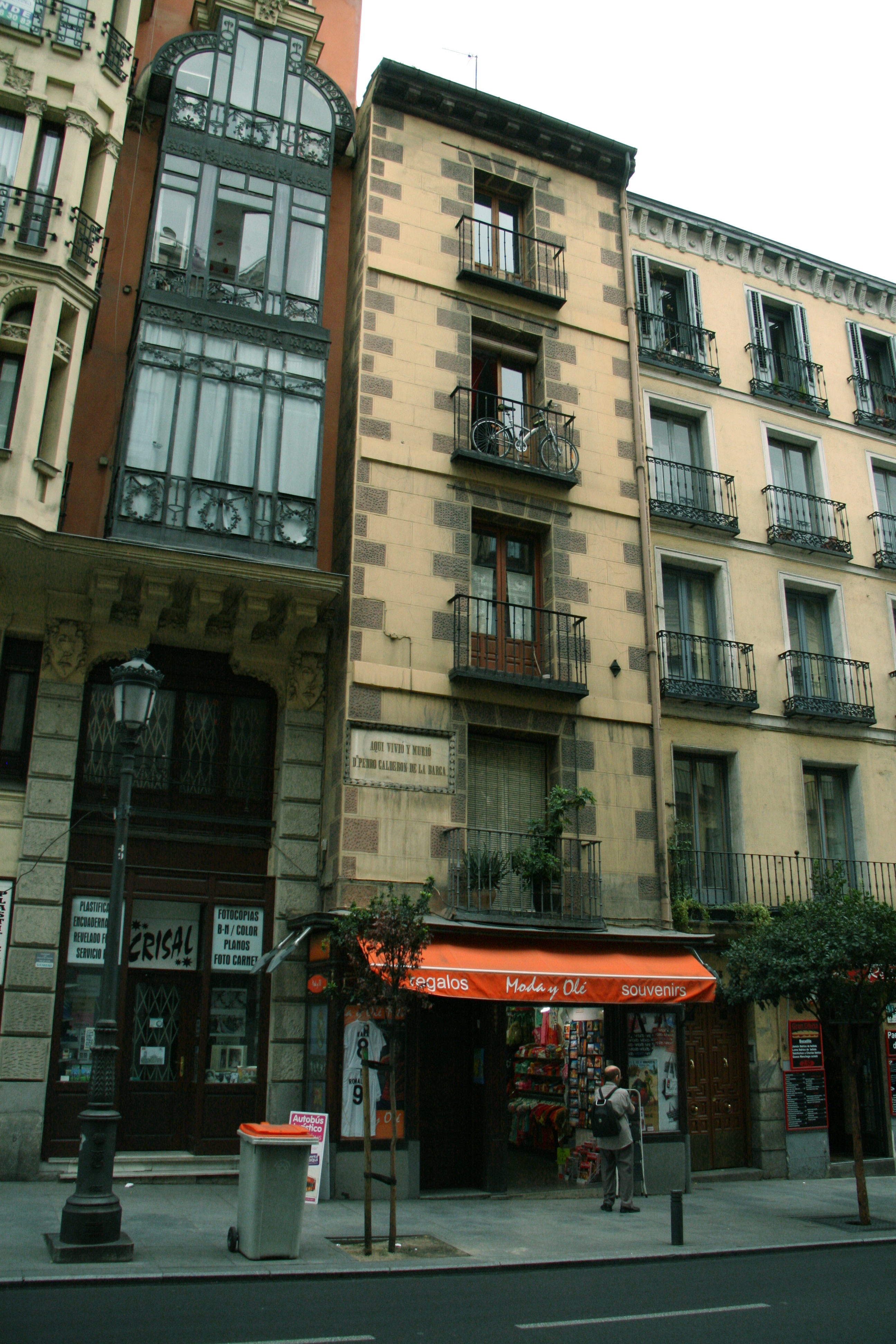 Casa donde vivió Calderón de la Barca, una de las mas estrechas de Madrid